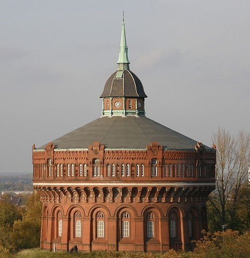 Der Wasserturm auf dem RavensbergThis is a photograph of an architectural monument.It is on the list of cultural monuments of Kiel